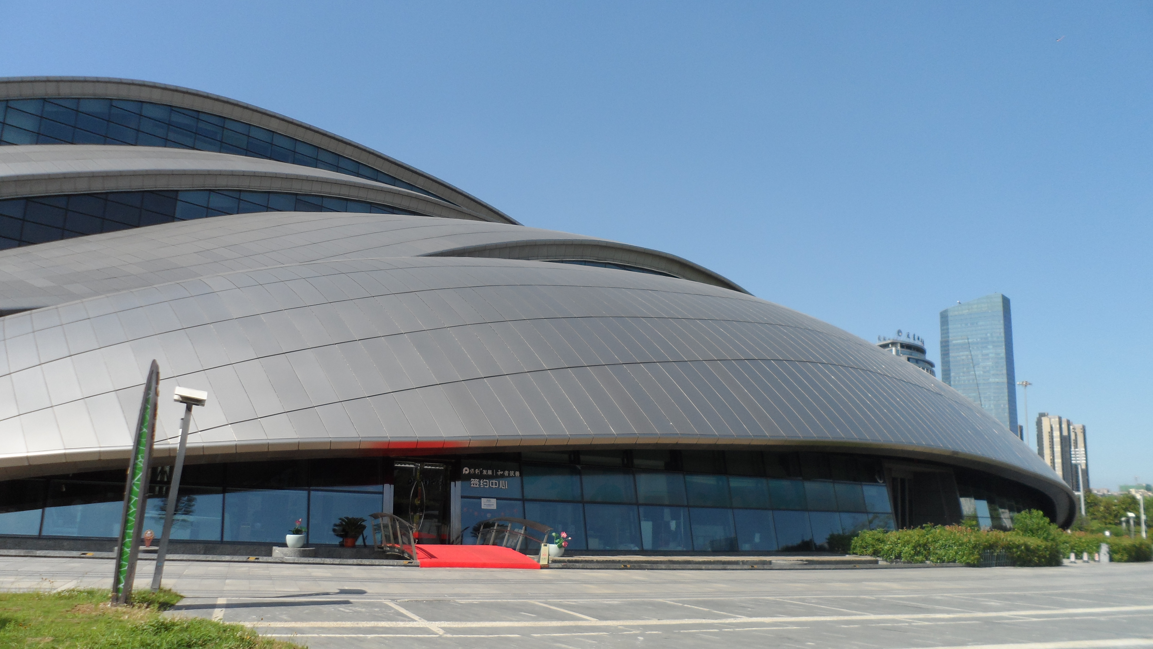 Hefei Grand Theatre